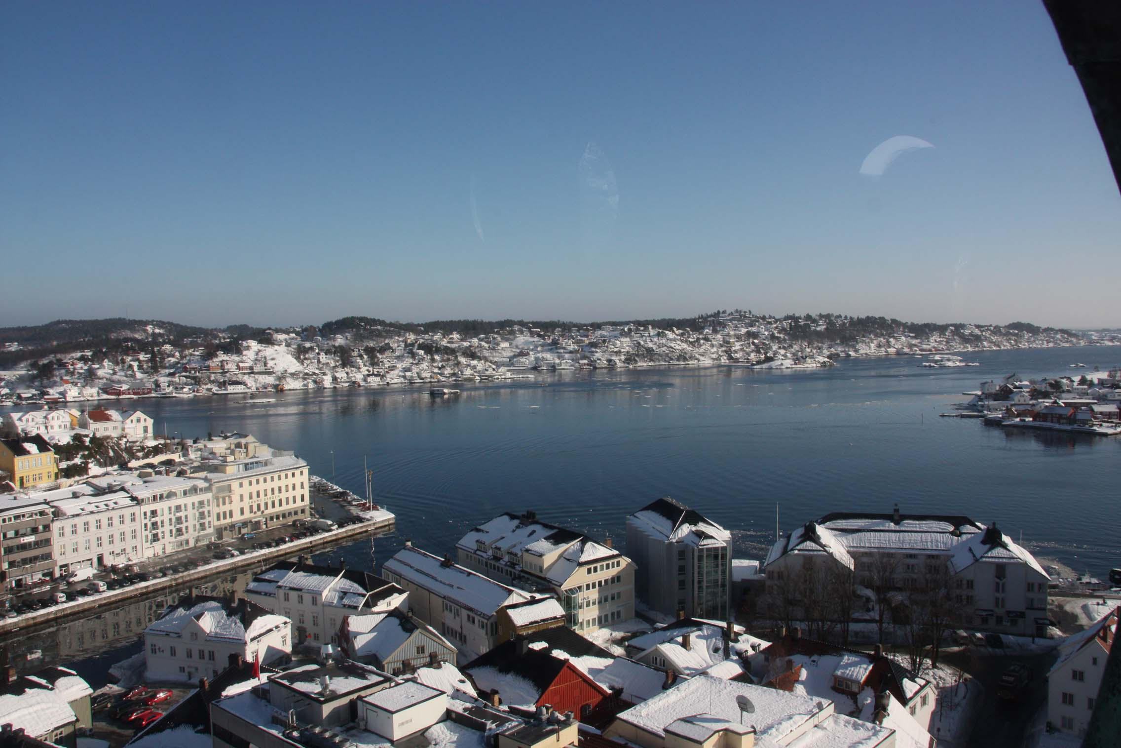 Vestre del av Tromøy, bilde tatt fra kirketårnet i Trefoldighetskirken i Arendal. Langbryggen nede til venstre.